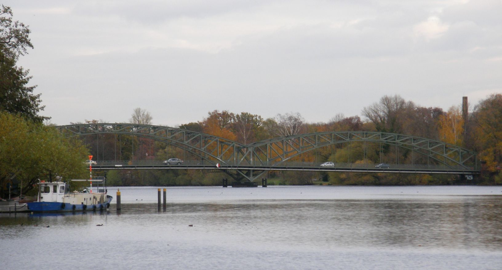 Eiswerderbrücke über die Havel in Berlin-Spandau